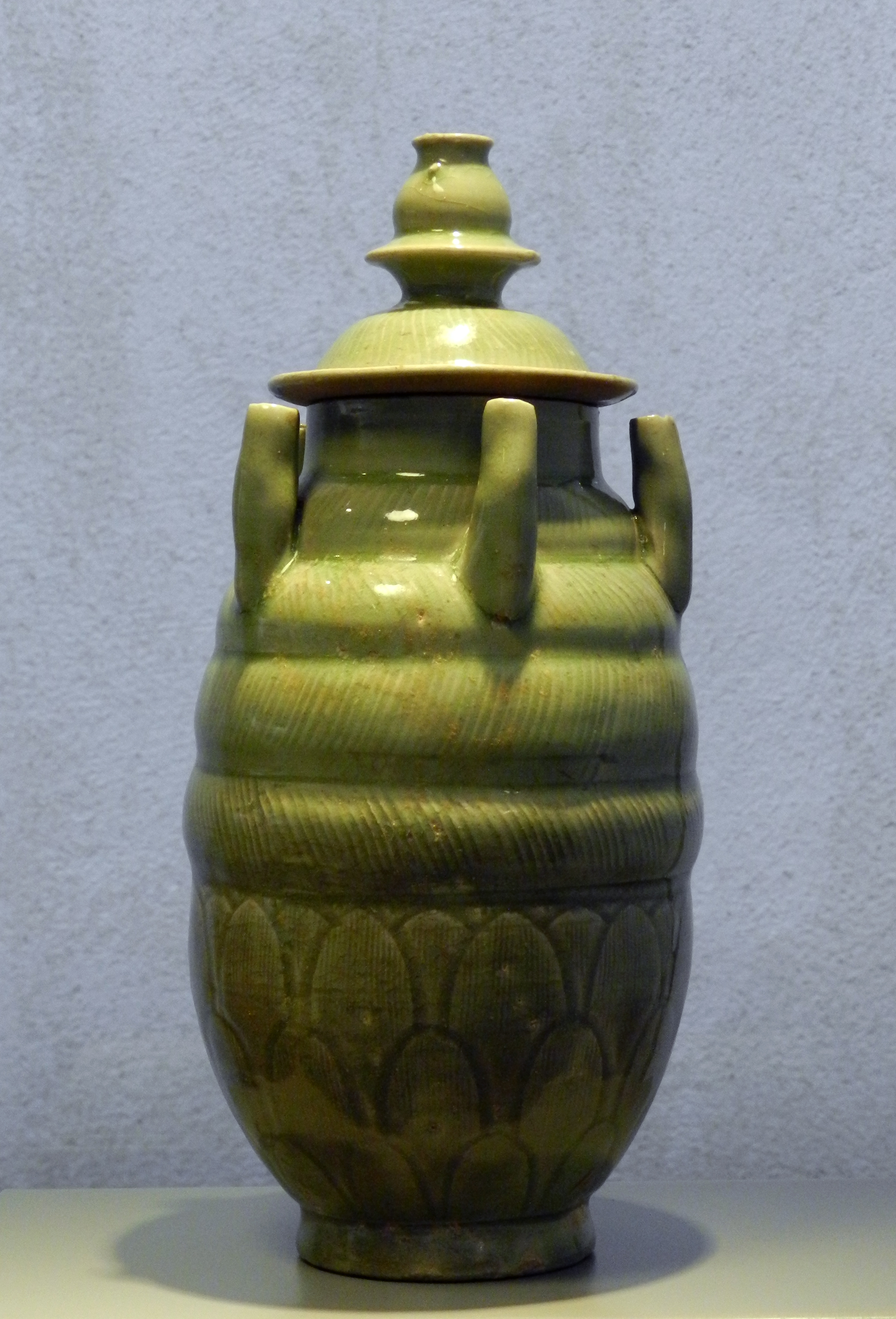 Grès porcelaineux à dècor incisé glaçure verte Chine (Fours de Yue, Zhejiang), Song du Nord (960-1126) This is a file created at the museum: Musée royal de Mariemont in Morlanwelz